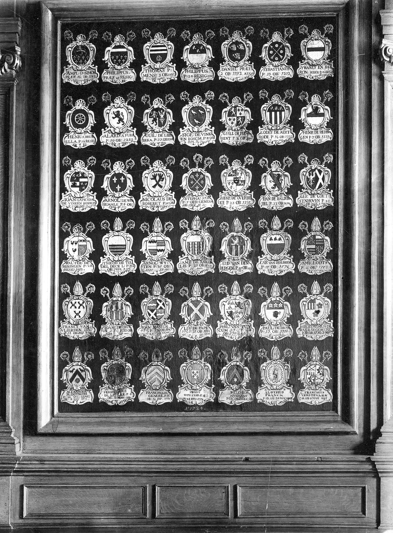 Datum: 1724 - 1724 Inscriptie: datering, geschilderd, midden onderaan: : A°172